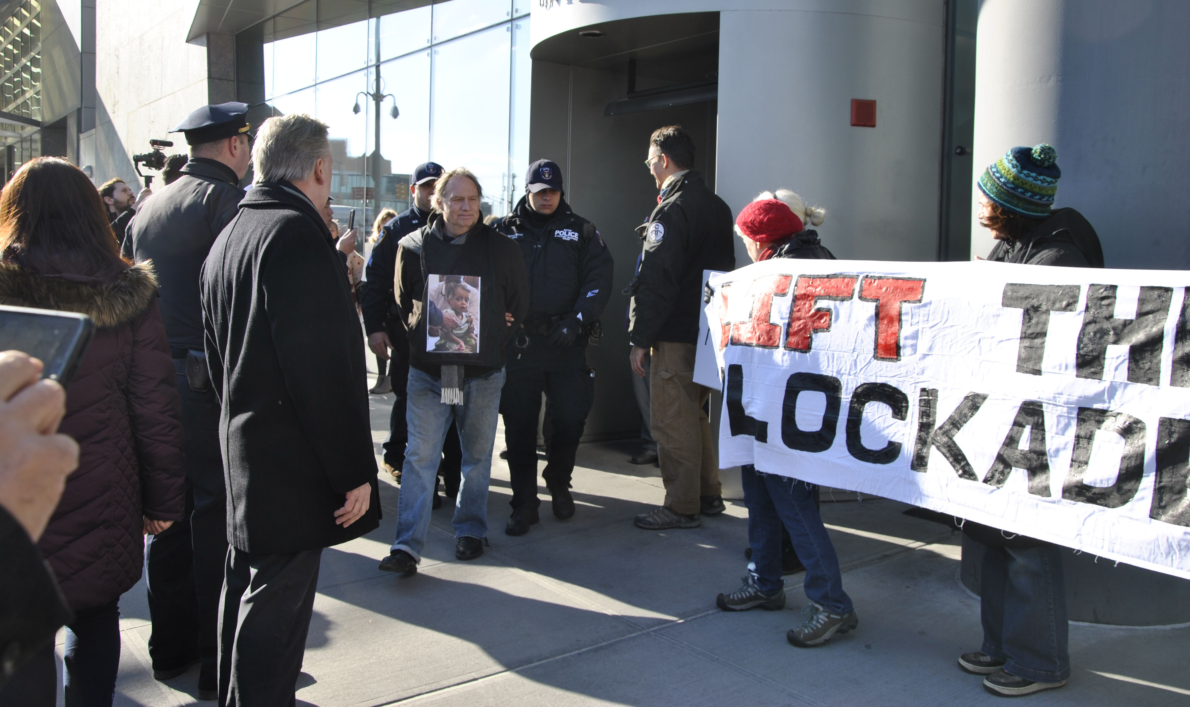 114 Arrests